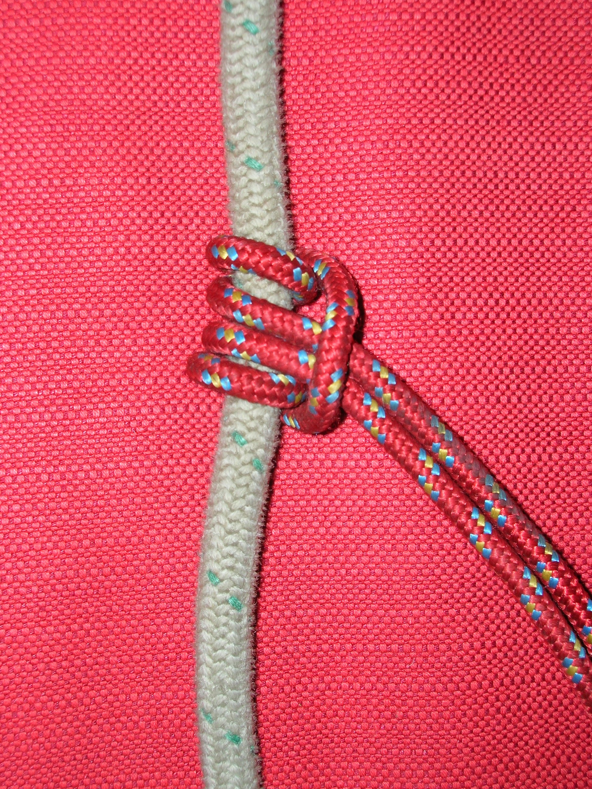 Nodo prusik. Foto mia.